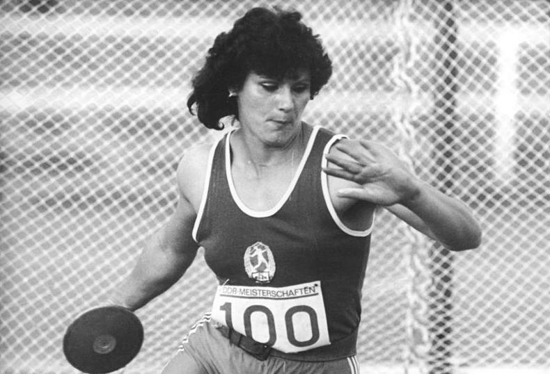 Martina Hellmann ADN-ZB Koard 20.8.87 Potsdam: 38. DDR-Leichtathletik-Meisterschaften- Weltmeisterin Martina Hellmann (SC DHfK Leipzig) gewann mit hervorragenden 72,92 m die Diskuswurf-Konkurrenz.